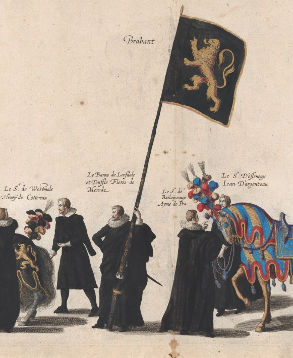 Pompes funèbres de l'archiduc Albert d'Autriche à Bruxelles / Série de 65 gravures d'un recueil relatant les funérailles d'Albert d'Autriche à Bruxelles le 11 mars 1622.